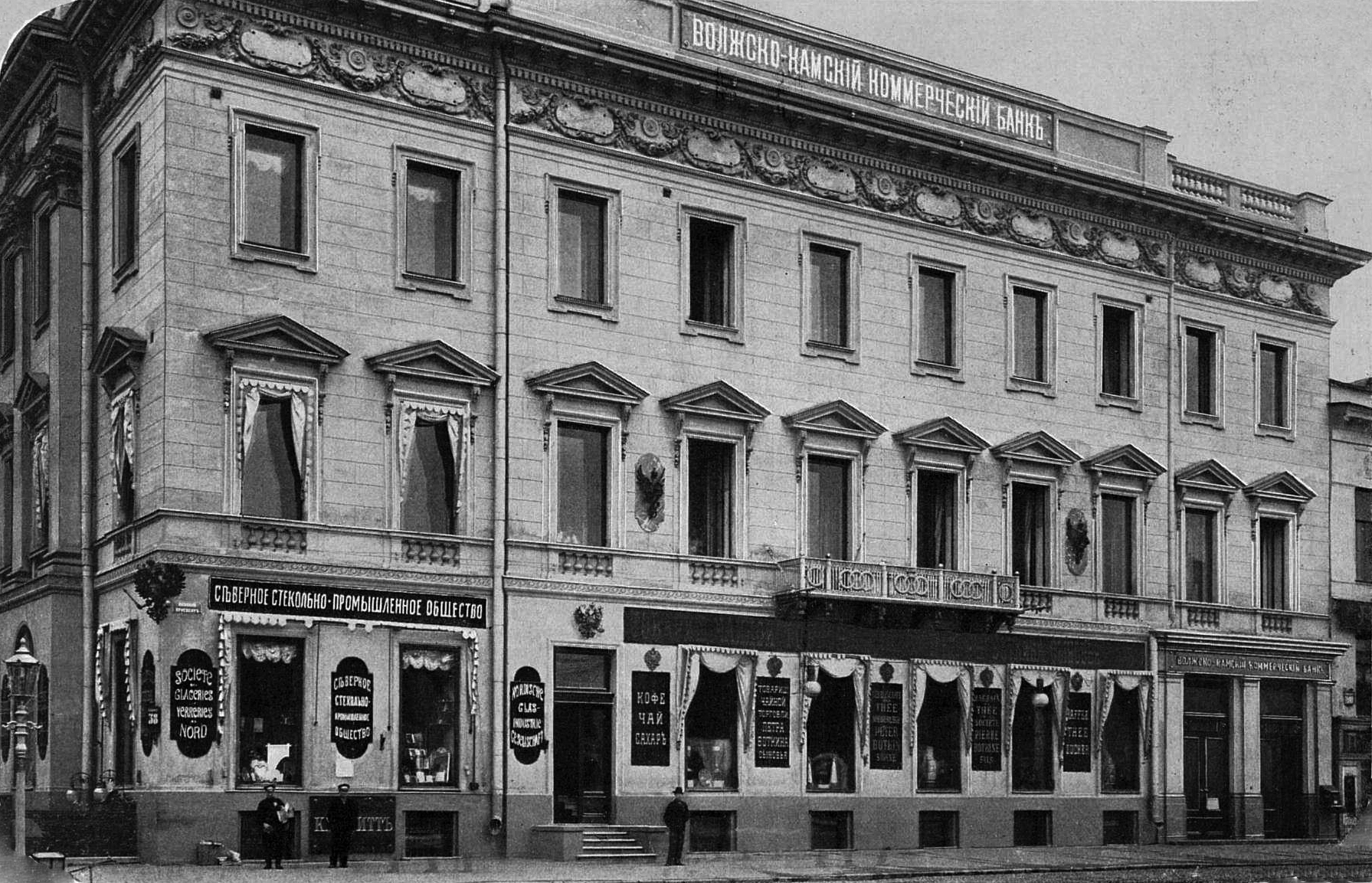 Невский, 38 - Михайловская, 4, фото около 1900 года